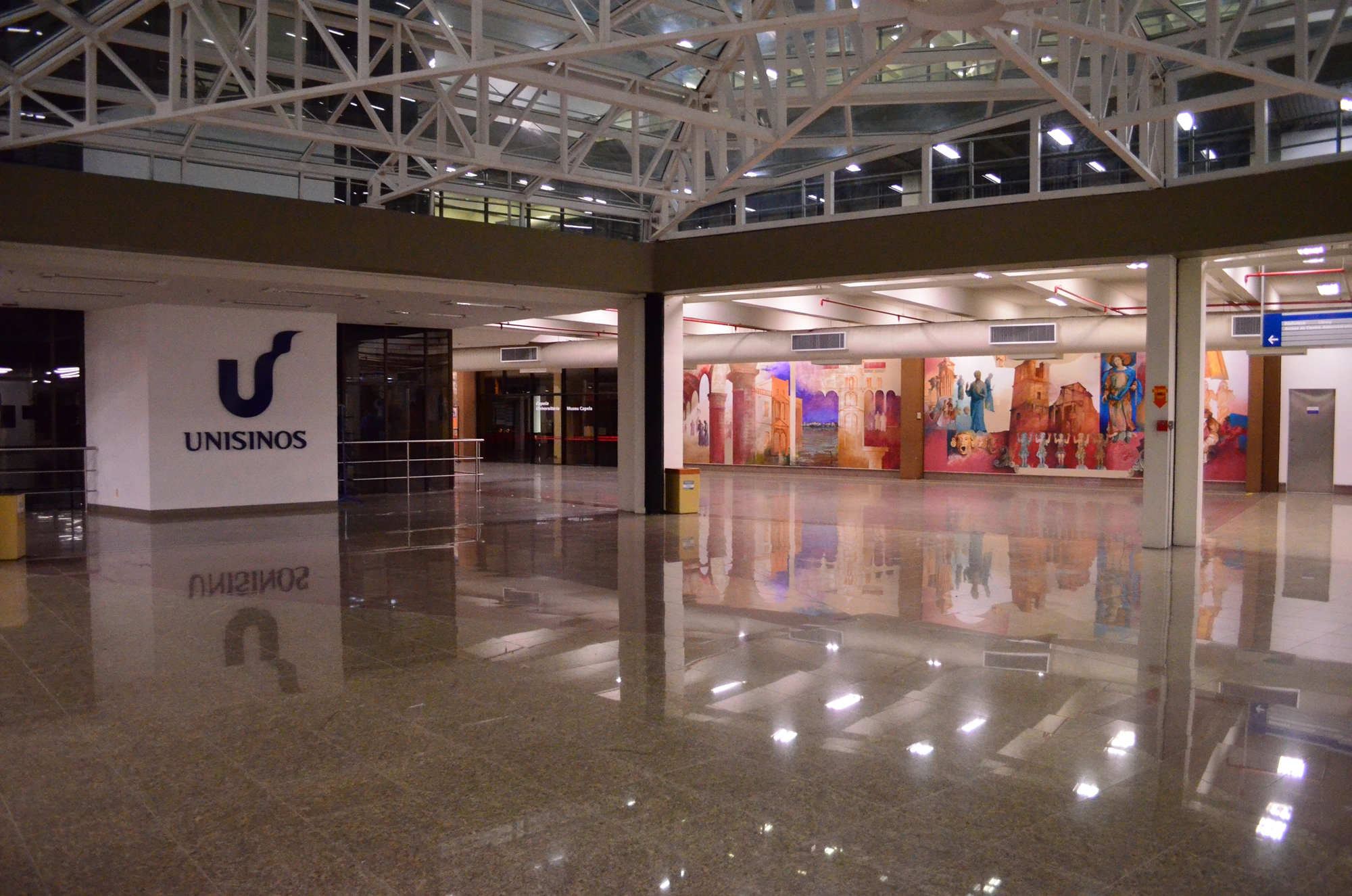 Logo da Unisinos no Subsolo da Biblioteca